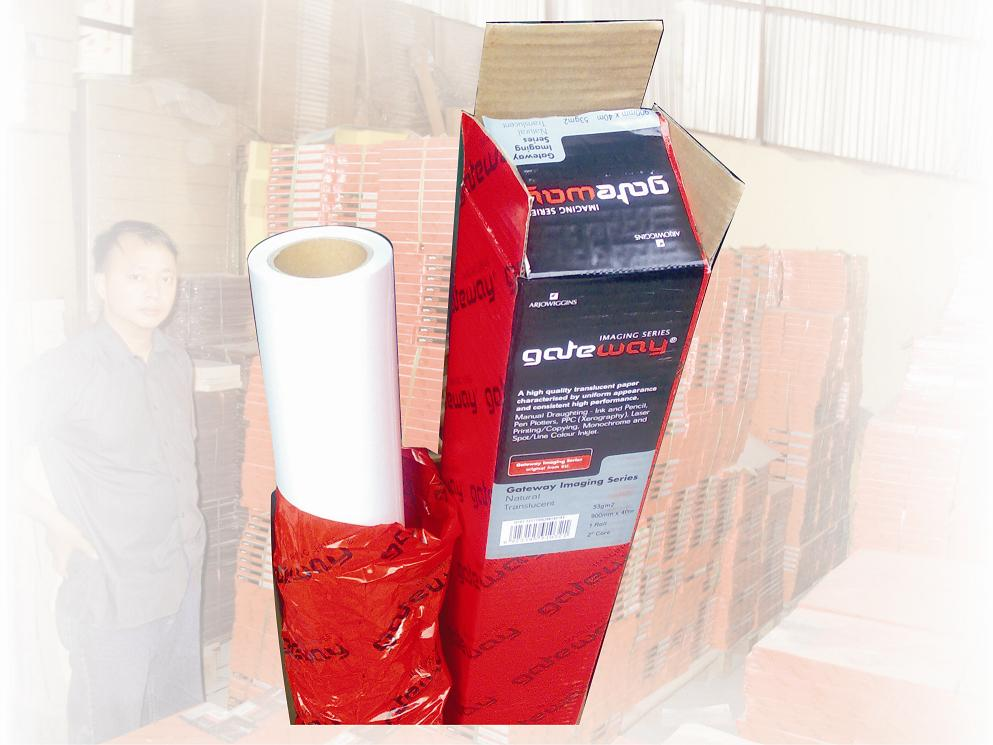 New roll of Gateway Tracing paper 2008 Cuộn giấy can Gateway mới, năm 2008